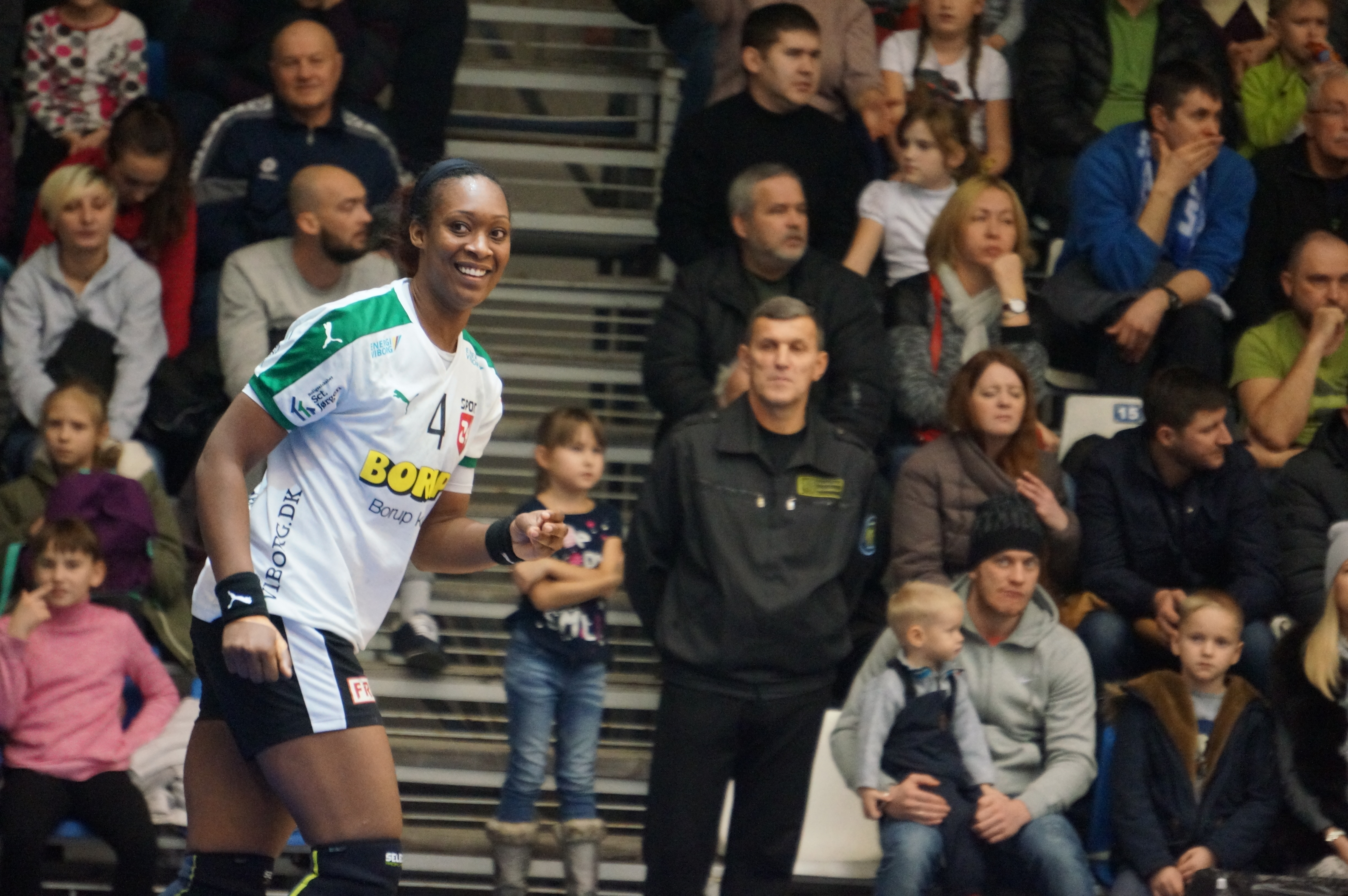 Мари-Поль Гнэбую (№4), гандбольный клуб "Виборг", Дания. Матч Кубка ЕГФ "Лада" (Тольятти) - "Виборг" (Виборг). Тольятти, Россия, 13 ноября 2016